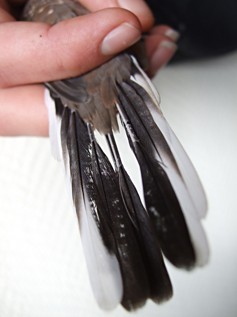 Reconstruction de plumes